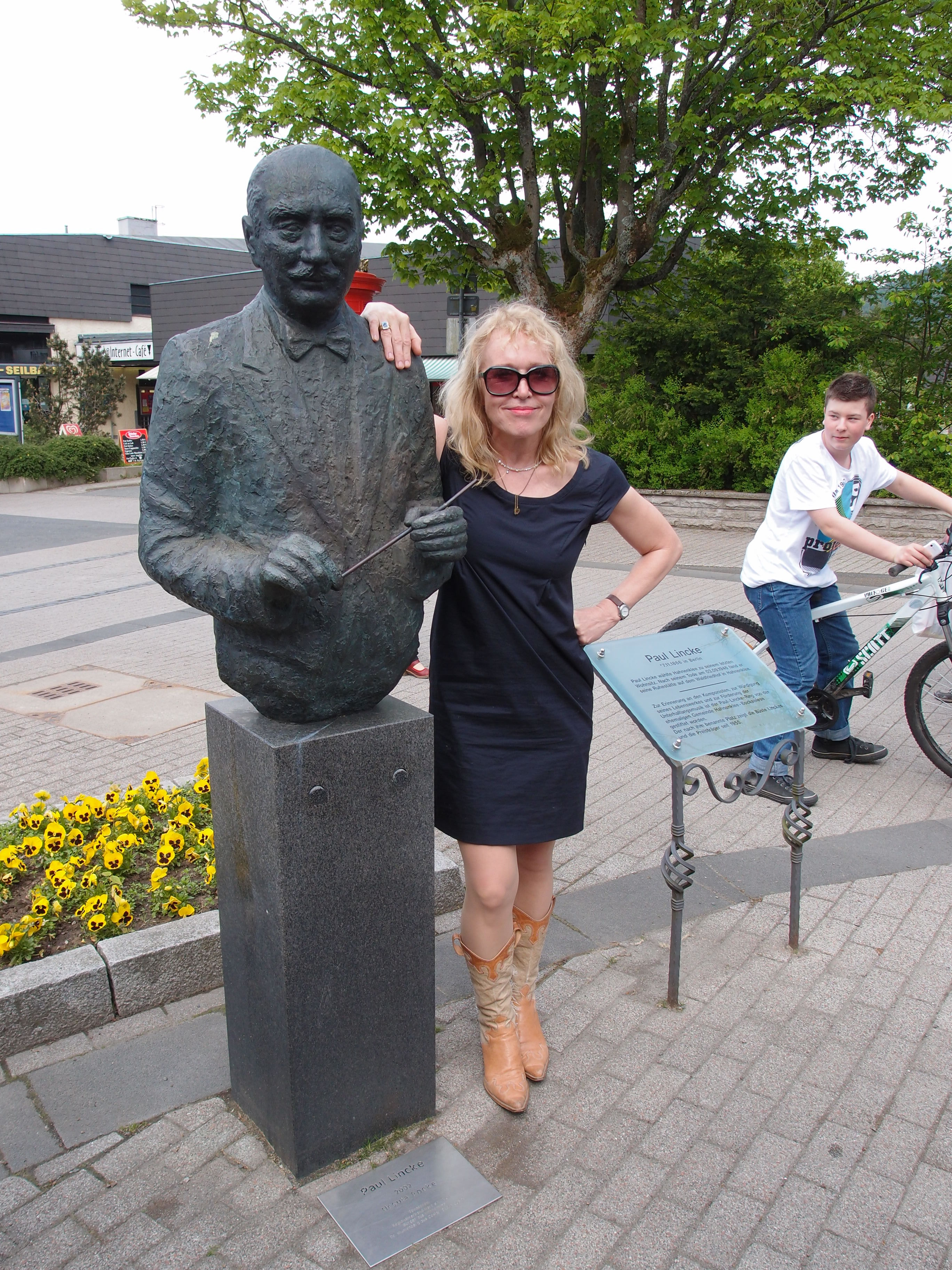 Annette Humpe bei der Verleihung des Paul-Lincke-Rings in Hahnenklee am Paul-Lincke-Denkmal. Am Ringfinger der rechten Hand trägt sie den Paul-Lincke-Ring.